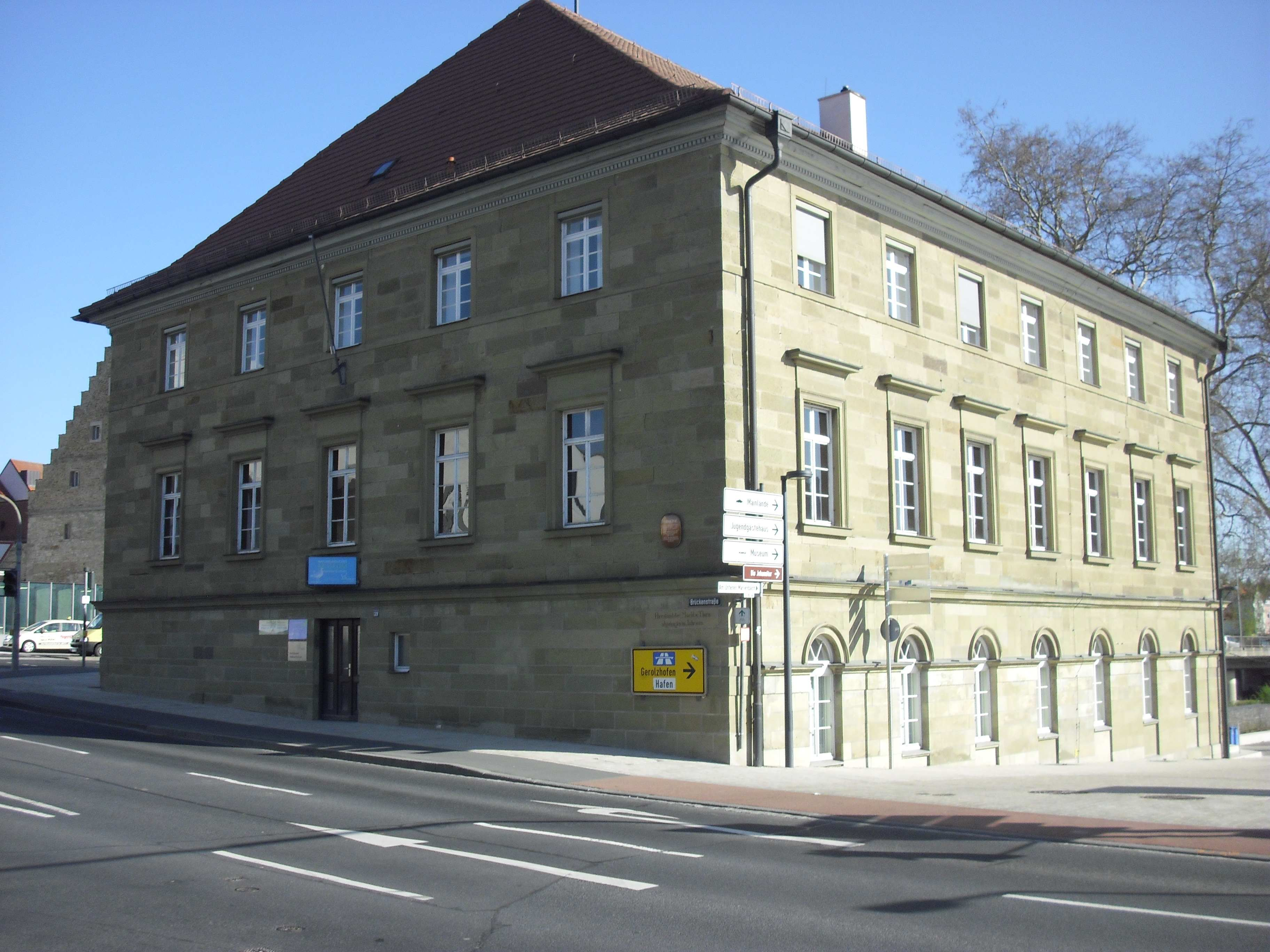 Gebäude des naturkundlichen Museums in Schweinfurt (Harmoniegebäude)